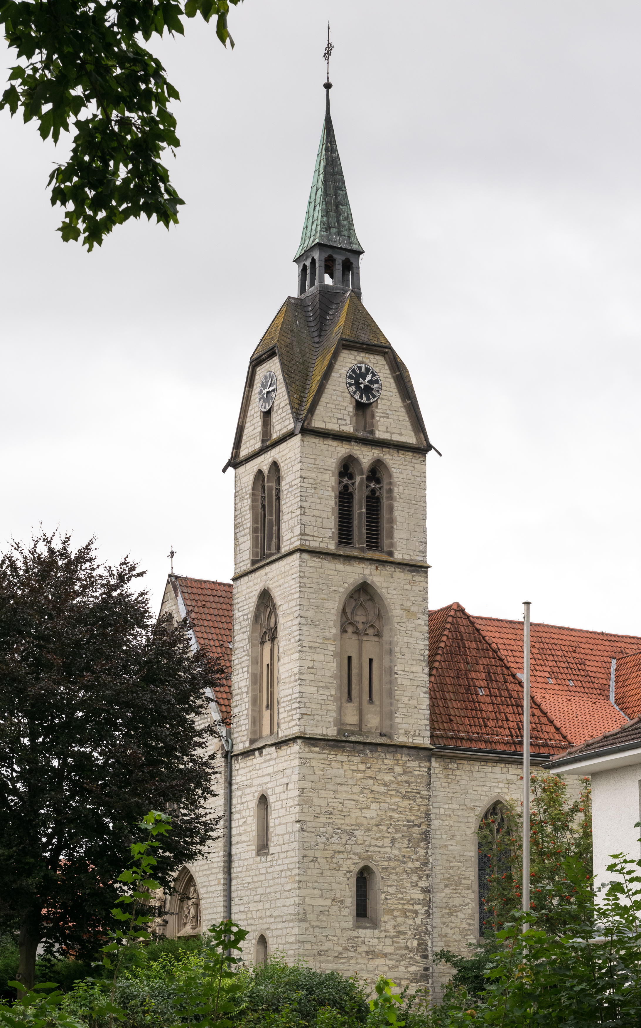 Neue Pfarrkirche St. Walburga in Borchen-Alfen